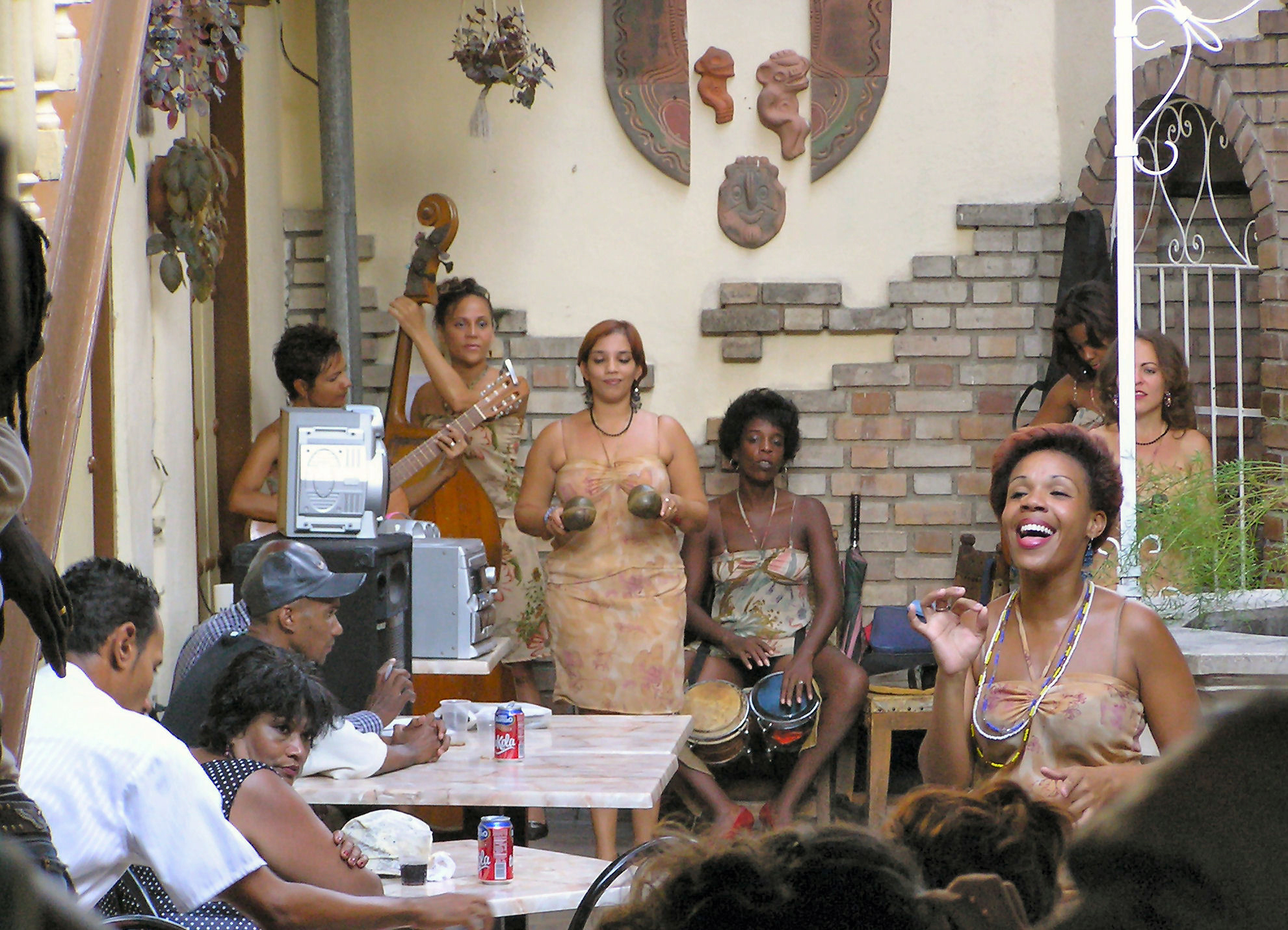 Santiago de Cuba - Les gens - Groupe musical féminin